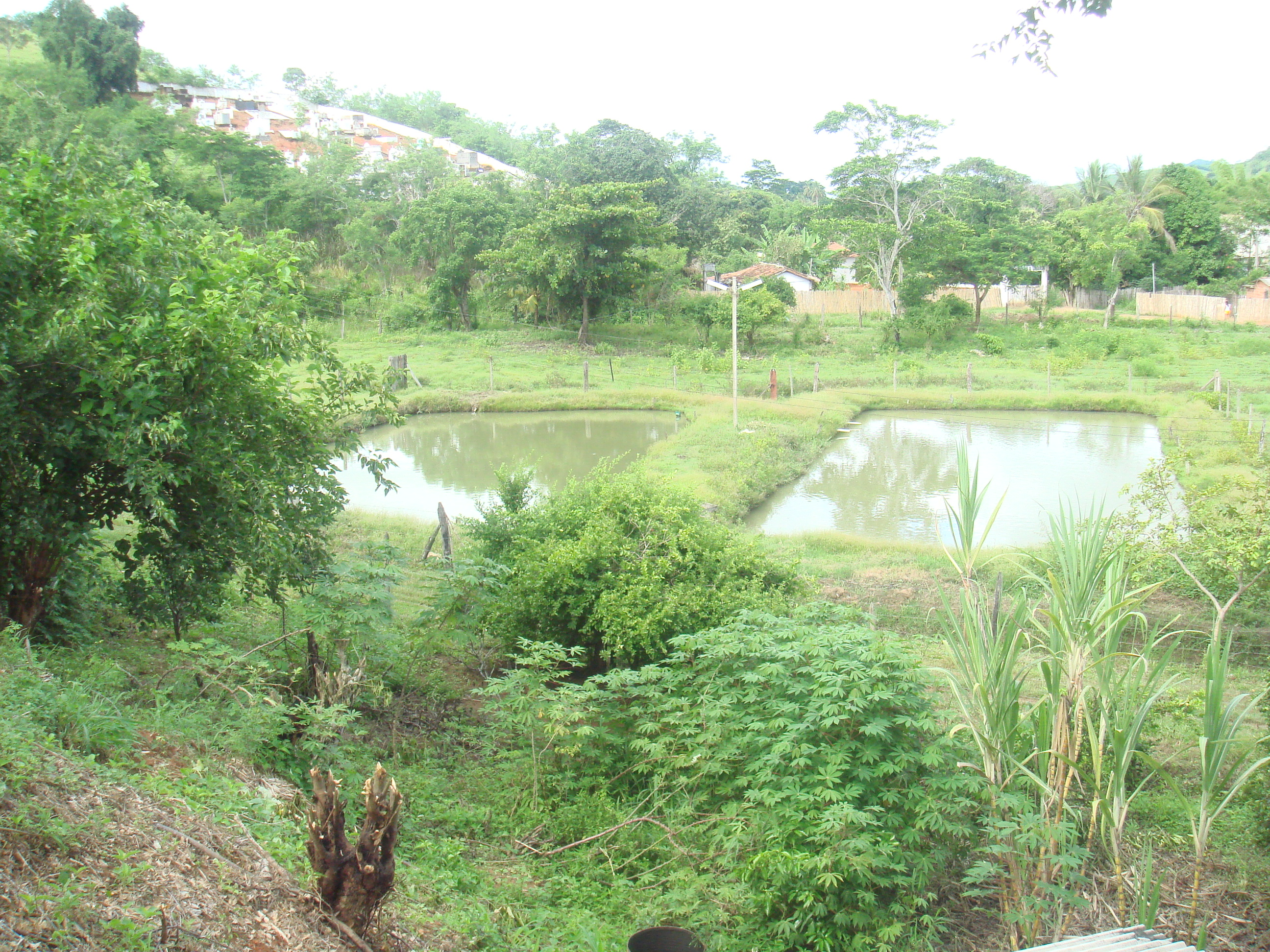 A economia pesqueira também é bastante significativa em Três Irmãos